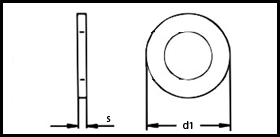 DIN 433